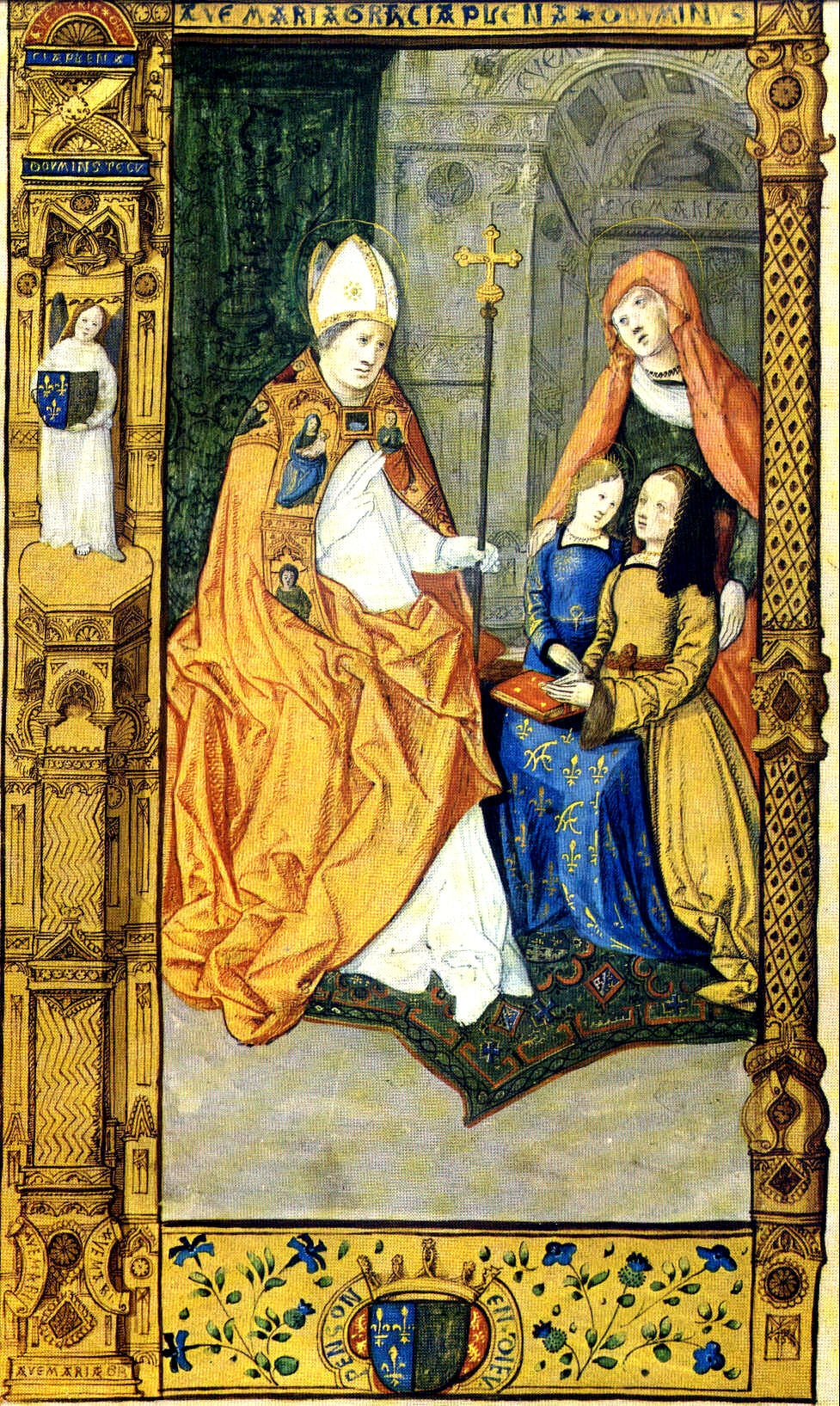 Miniatur Claude mit Schutzheiligen